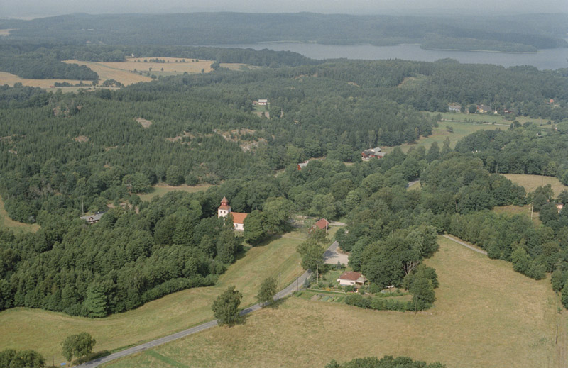 Dagsås kyrka. Bilden är tagen mot (väderstreck): NO Motiv: Dagsås Nyckelord: Flygbilder, Riksintressen Kategori: KyrkomiljöDagsås kyrka. Bilden är tagen mot (väderstreck): NO.